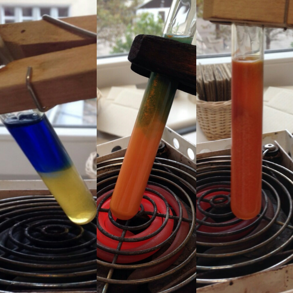 Mise en évidence du glucose dans le miel avec la liqueur de Fehling